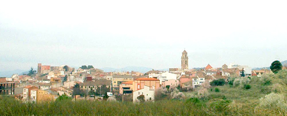 Vista de Falset al Priorat, (Catalunya).